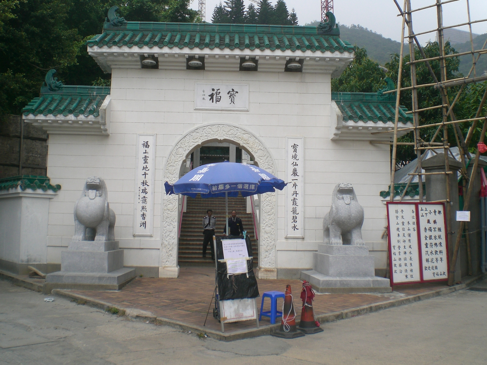 沙田寶福山園內環境